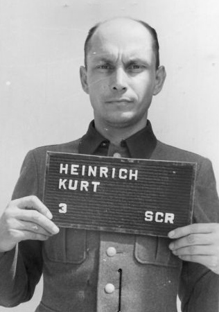 Haftbogenfoto des Angeklagten Richard Kurt Heinrich (23.05.1911 in Zittau - ?), SS-Obersturmführer, Block- und Kommandoführer im Konzentrationslager Buchenwald, Adjutant des Kommandanten im Konzentrationslager Mittelbau-Dora, im Dachauer Dora-Prozess ("Case No. 000-50-37 Dora") am 30.12.1947 freigesprochen, 1948 in einem Spruchkammerverfahren zu zwei Jahren und zehn Monaten Haft verurteilt, die auf die bisherige Haft in einem Internierungslager angerechnet wurden.